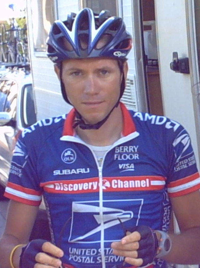 José Azevedo à Izernore au départ d'une étape du Tour de l'Ain 2004 le 12 août.